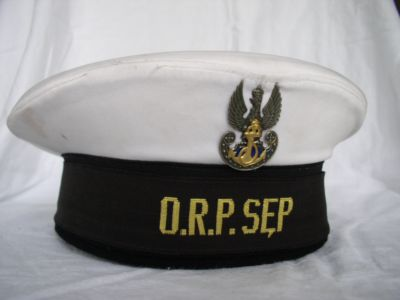 czapka marynarza służącego na ORP Sęp